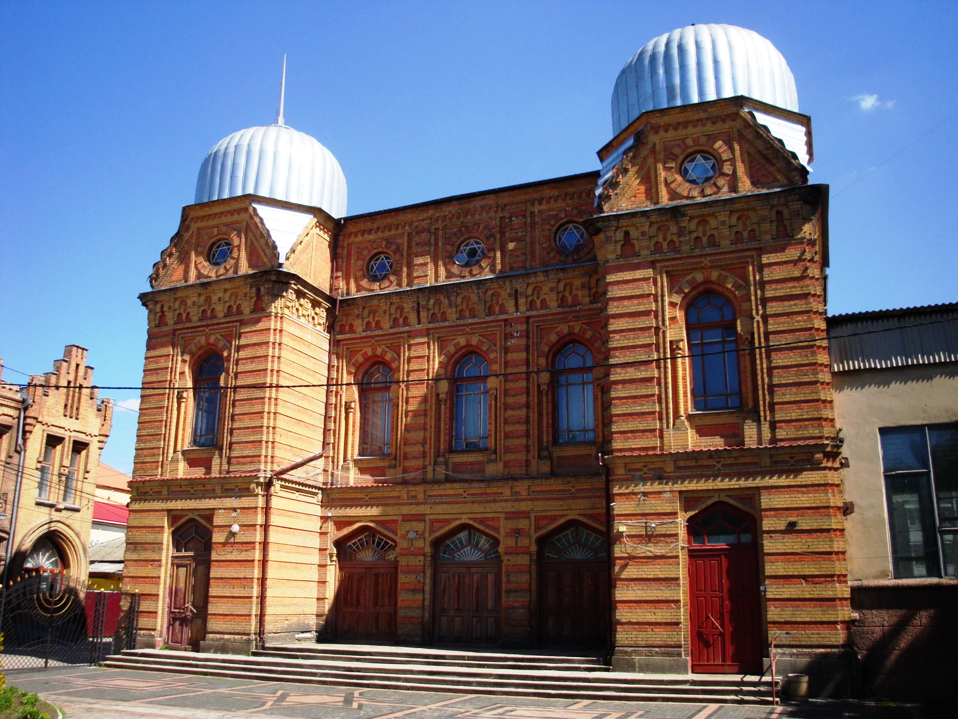 Синагога, Кропивницький, вул. В. Чміленка (Дзержинського), 90/40 (ріг Пашутінської)